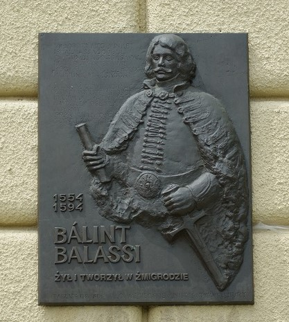 Bálint Balassi, węgierski poeta epoki odrodzenia.Tablica na budynku Liceum Ogólnokształcącego w Nowym Żmigrodzie